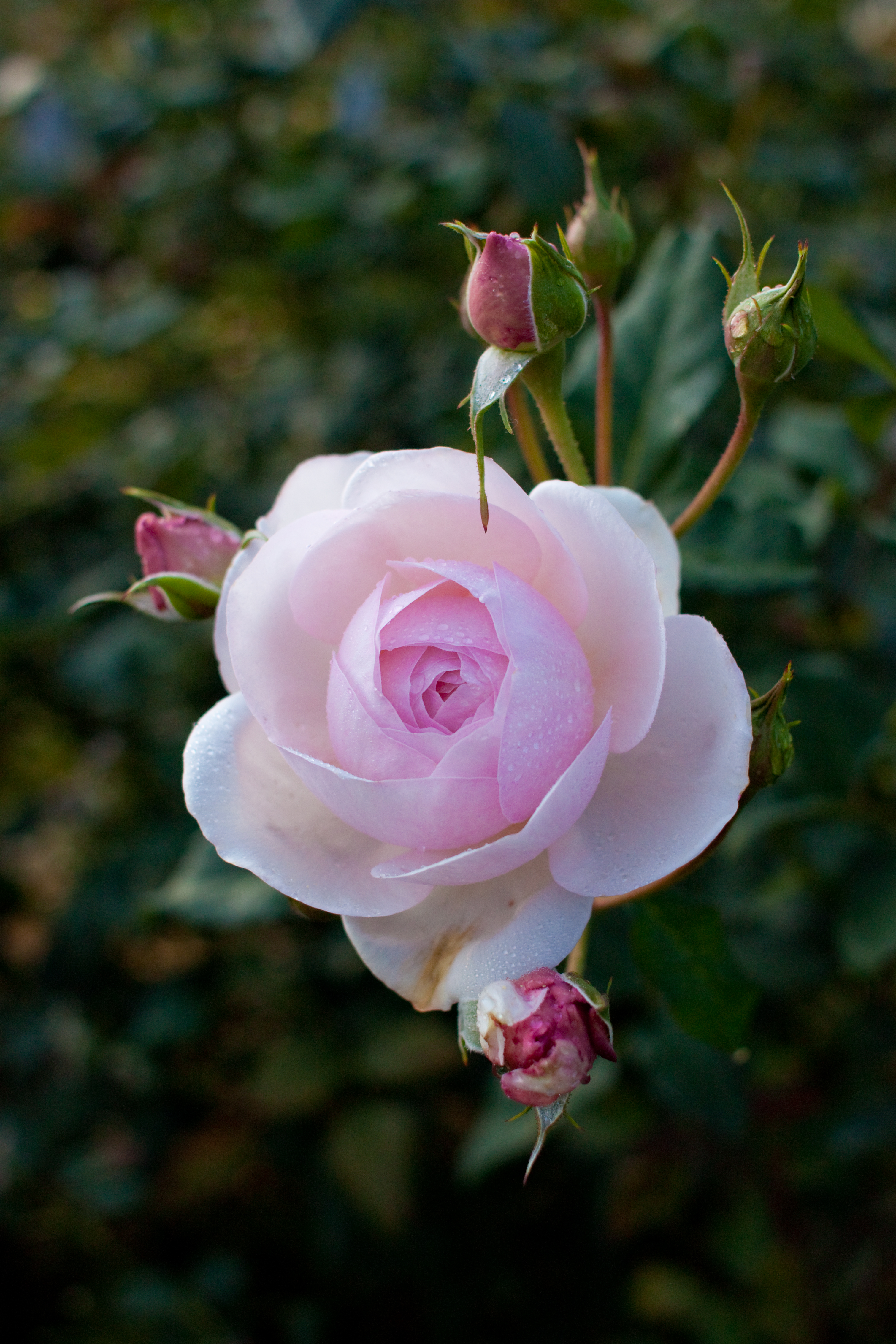 St. Cecilia. セイントセシリア。最初はカップ咲きで、咲き進むとロゼット咲きになります。まろやかなイメージのバラ。